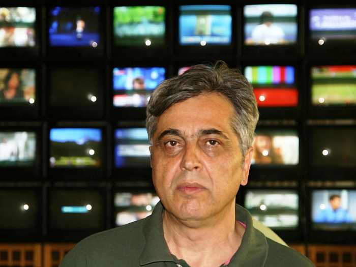 Ljubisa Obradovic RTS 5